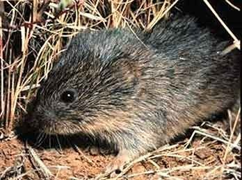 Os alcatrazes do campo é um éspecie de roedor nativa dos Estados Unidos.